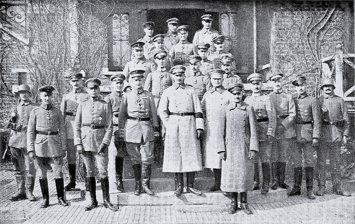 Großherzog Friedrich Franz IV. mit Offizieren des Grenadier-Regiments Nr. 89 vor dem Regiments-Stabsquartier in Evin-Malmaison. Gen. Frhr. V. Heinze Lt. v. Henning auf Schönhof Hptm. v. Witzendorff (Ernst) / Divisions-Pfarrer Busch Lt. v. Bülow Lt. d. Res. Meyer / Rittm. Brinkmann Hptm. v. Grone S. k. H. der Großherzog Major de Rainville Major v. Wulffen Lt. d. Res. Schräder / Oberlt. V. Heyden Lt. d. Landw. Simonsen